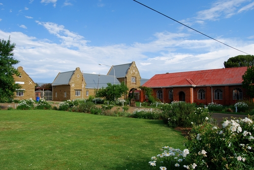 School buildings in Tweespruit